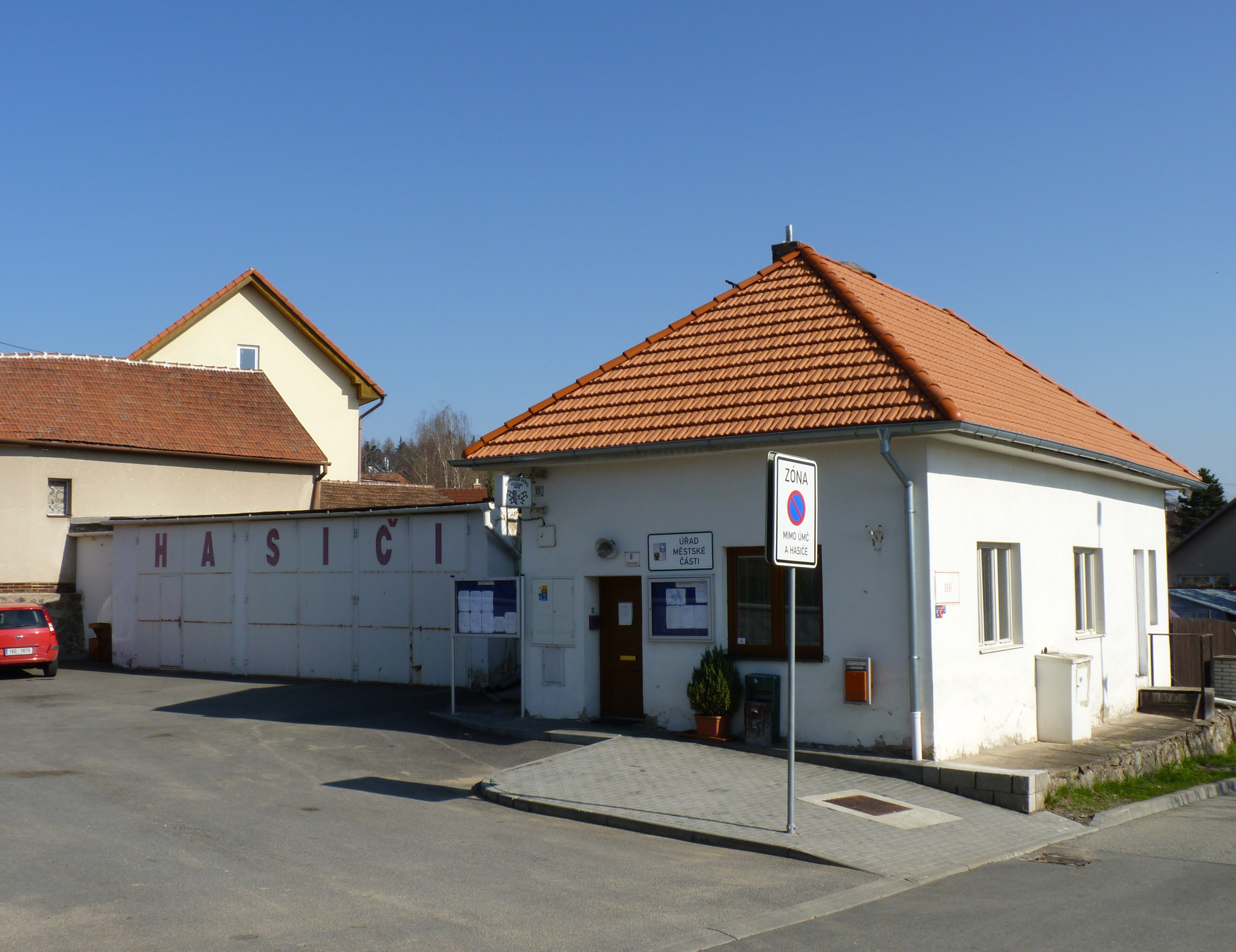 Ranice. Brno-Útěchov